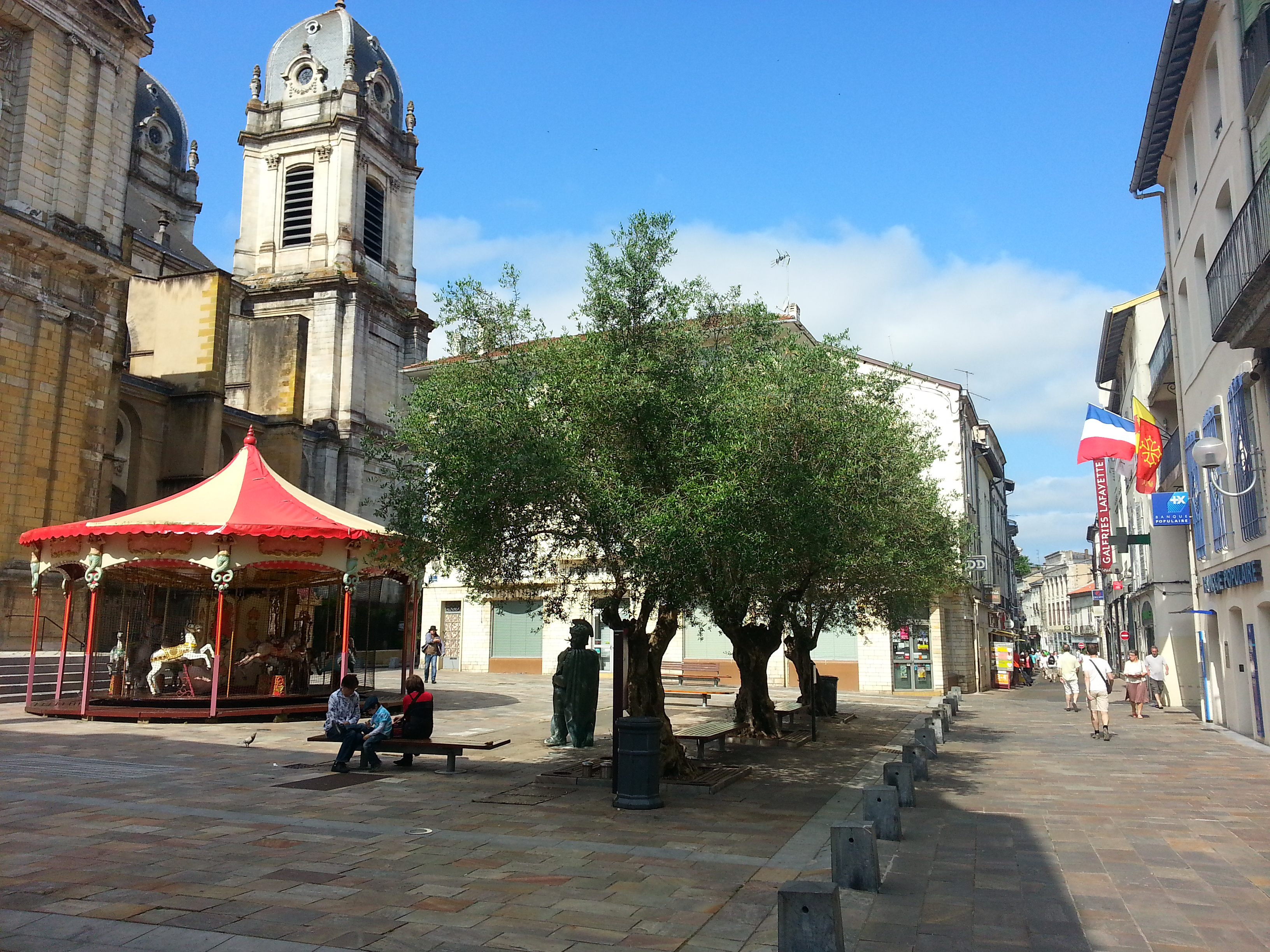 Dax